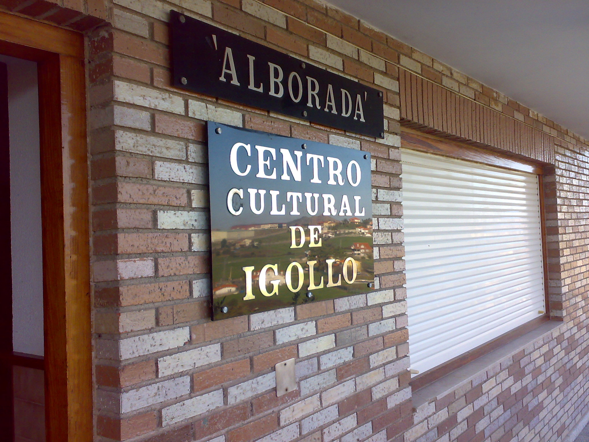 Cartel situado en la entrada del local. Reflejado se vislumbra parte del pueblo de Igollo